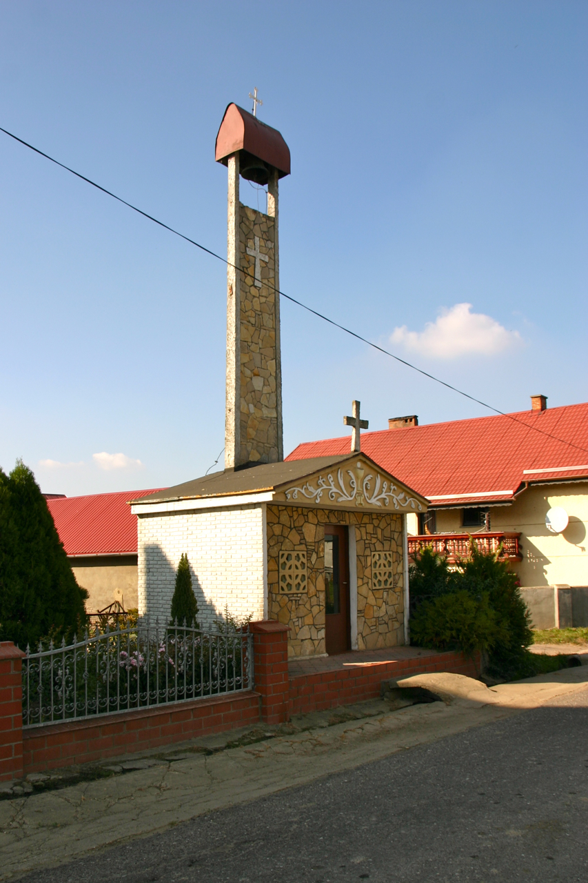 Grodzisko - wieś w Polsce położona w województwie opolskim, w powiecie kędzierzyńsko-kozielskim, w gminie Pawłowiczki.